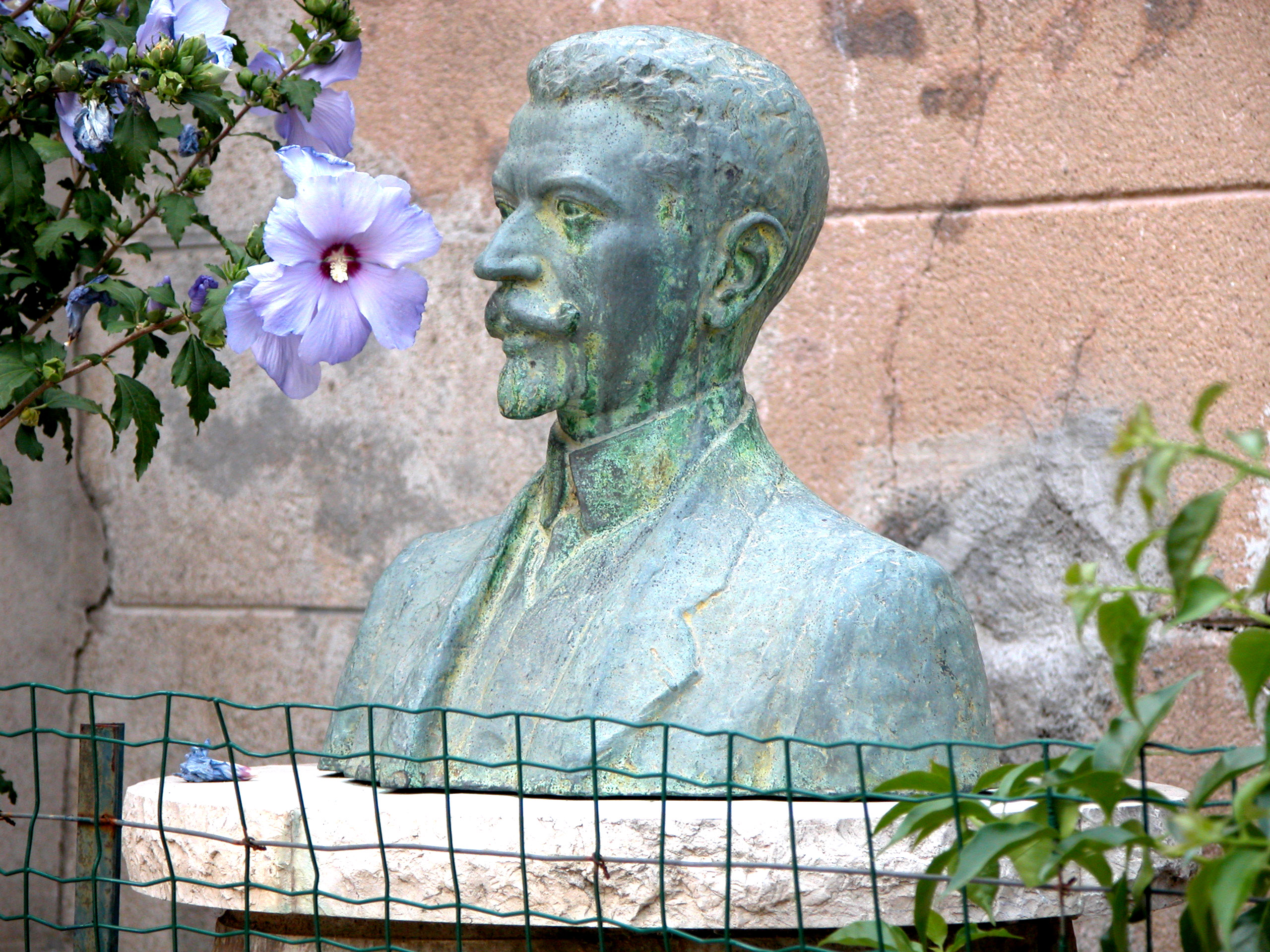 Buste d'Amédée Borrel à Cazouls-lès-Béziers - Photo personnelle prise en 2005.